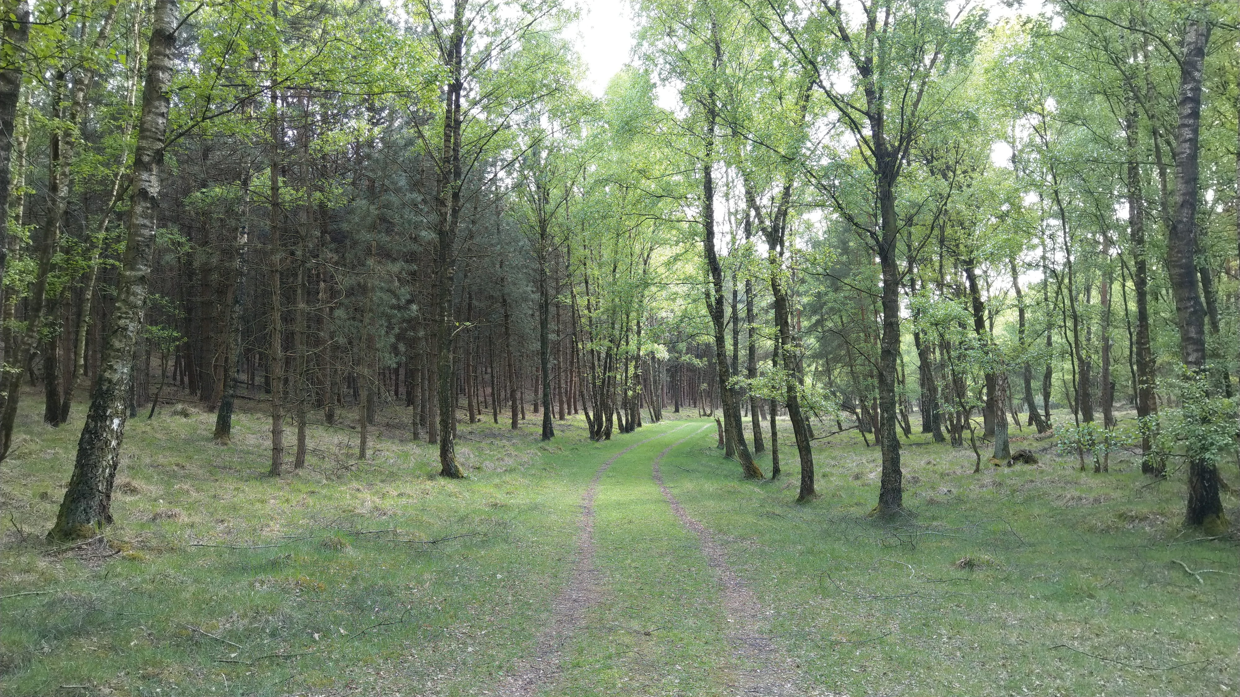 Naturschutzgebiet Brachter Wald Grüner Rundweg